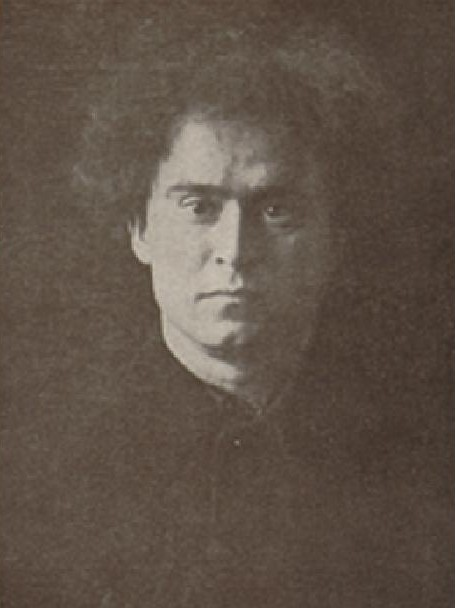 Alex Adolf Jelínek, český malíř, grafik, ilustrátor a spisovatel